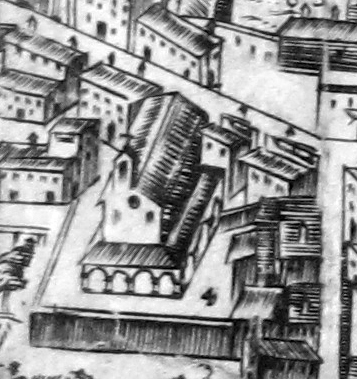 Pianta del buonsignori, dettaglio 004 sant'antonio (di vienne)